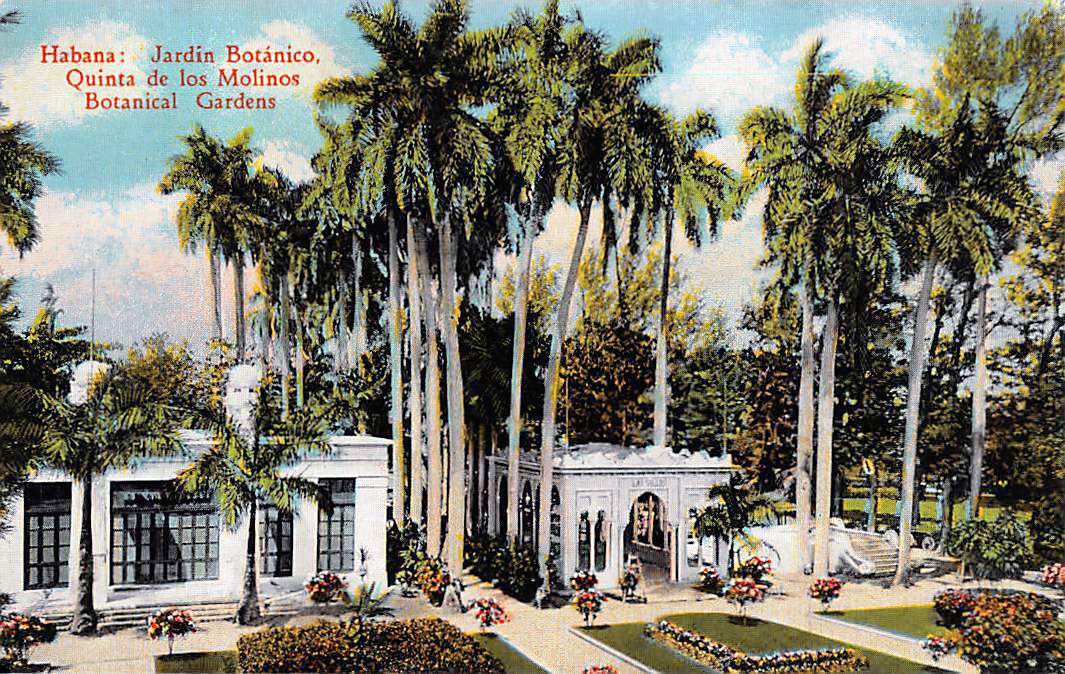 Una imagen del segundo Jardin Botanico que tuvo la Habana